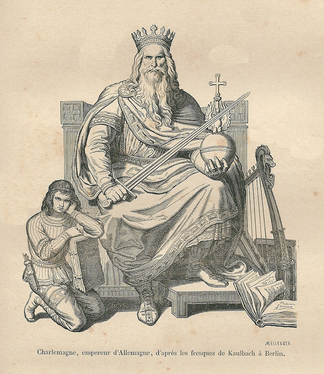 Charlemagne - gravure de la fin du XIXe siècle, d’après les fresques de Kaulbach à Berlin.